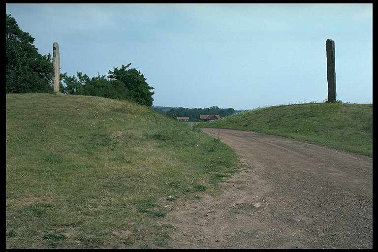 Runstenarna Vg55 och Vg56 på var sida av vägen. Motiv: Källby 23:2, Källby 23:3 Nyckelord: Runor Kategori: Runristning/runsten Runstenarna Vg55 och Vg56 på var sida av vägen. Källby 23:2, Källby 23:3.